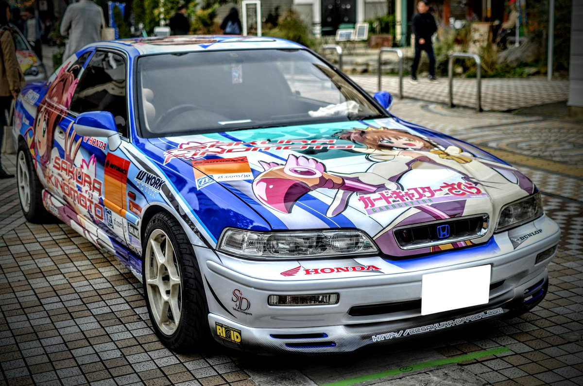 『カードキャプターさくら』木之本桜の痛車。2018年11月18日「8はちアソビ」にて撮影。